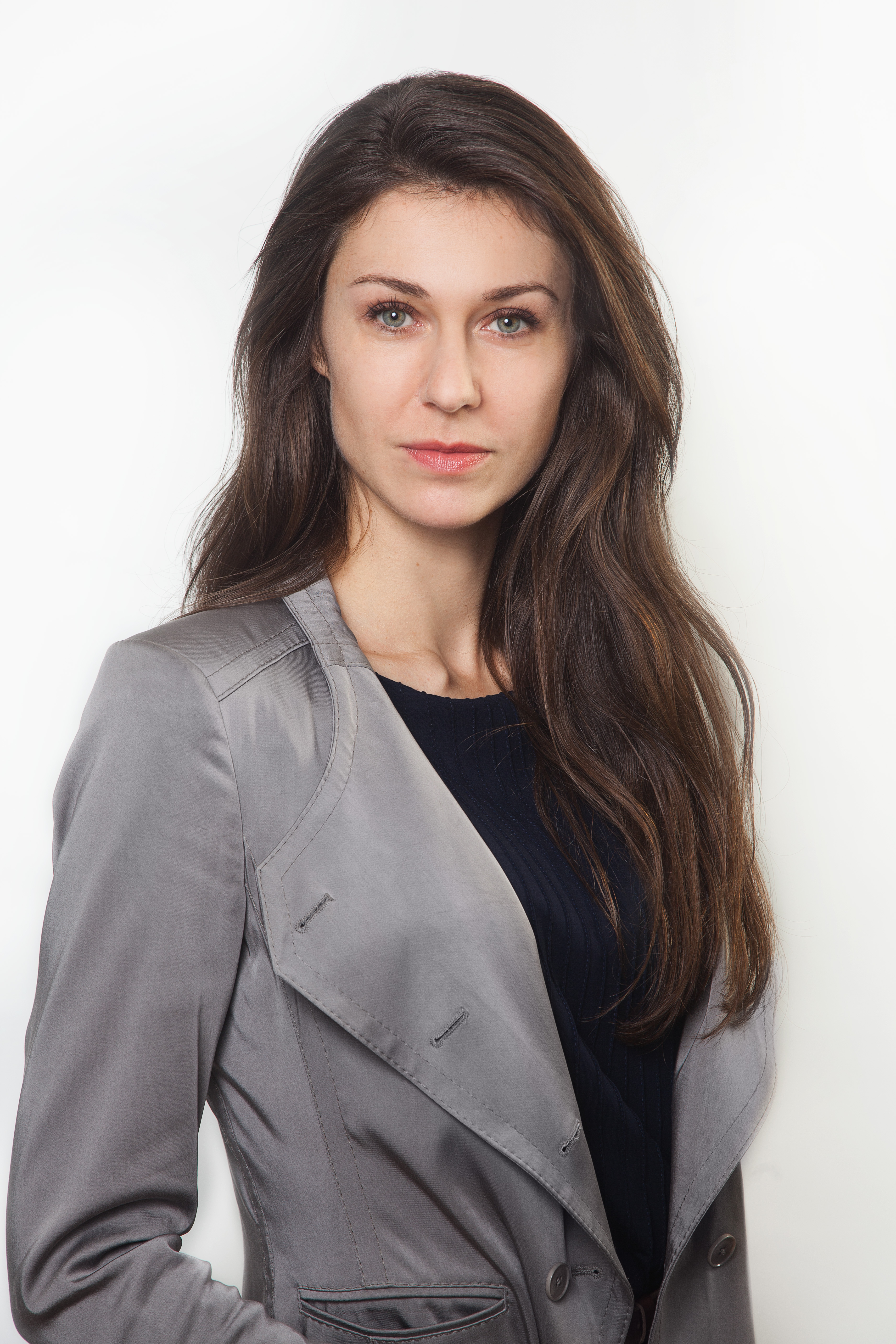 Portraet Raffaela Schaidreiter